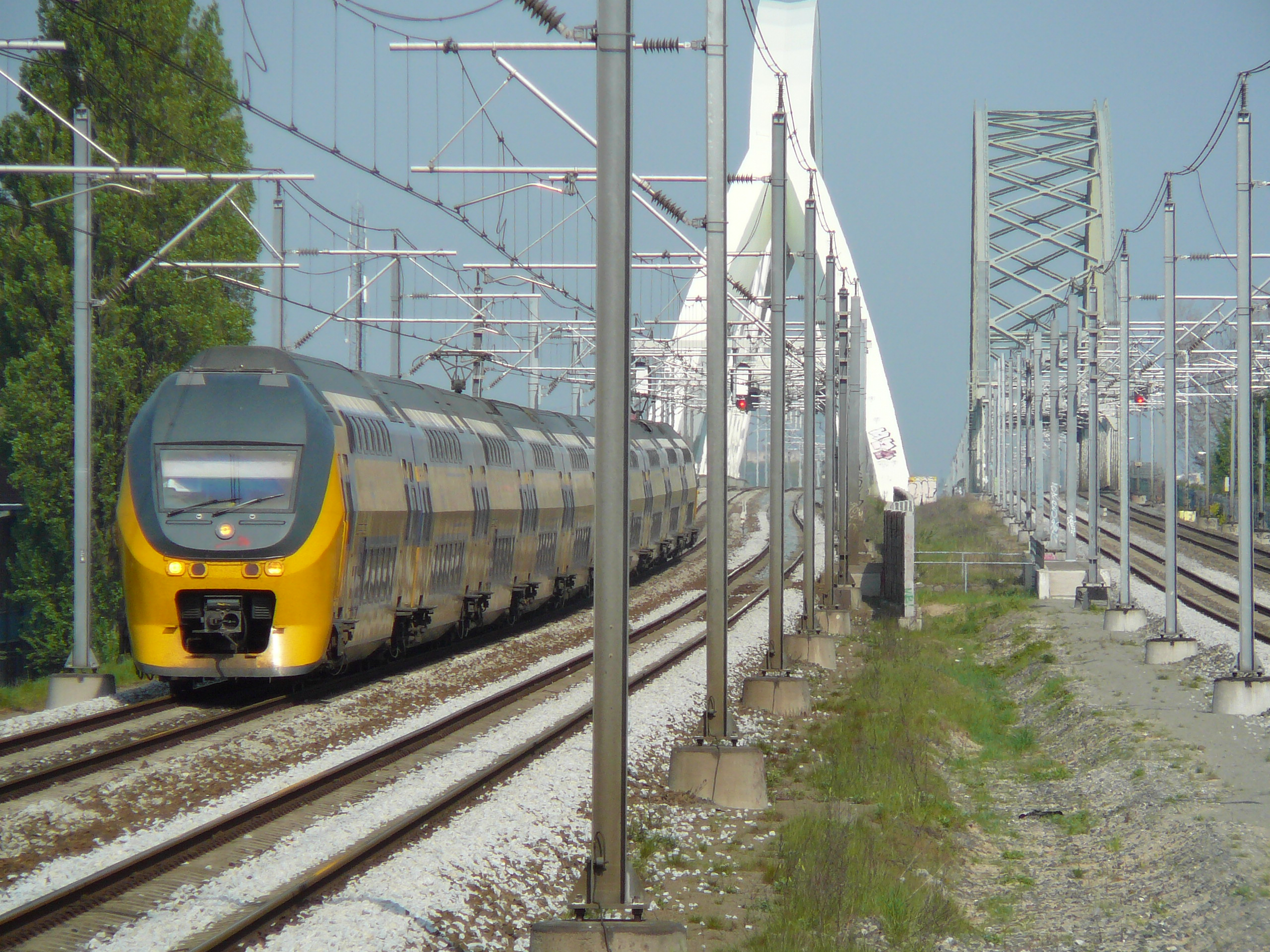 8743 + 9416 Alkmaar - Maastricht/Heerlen, Utrecht Zuilen